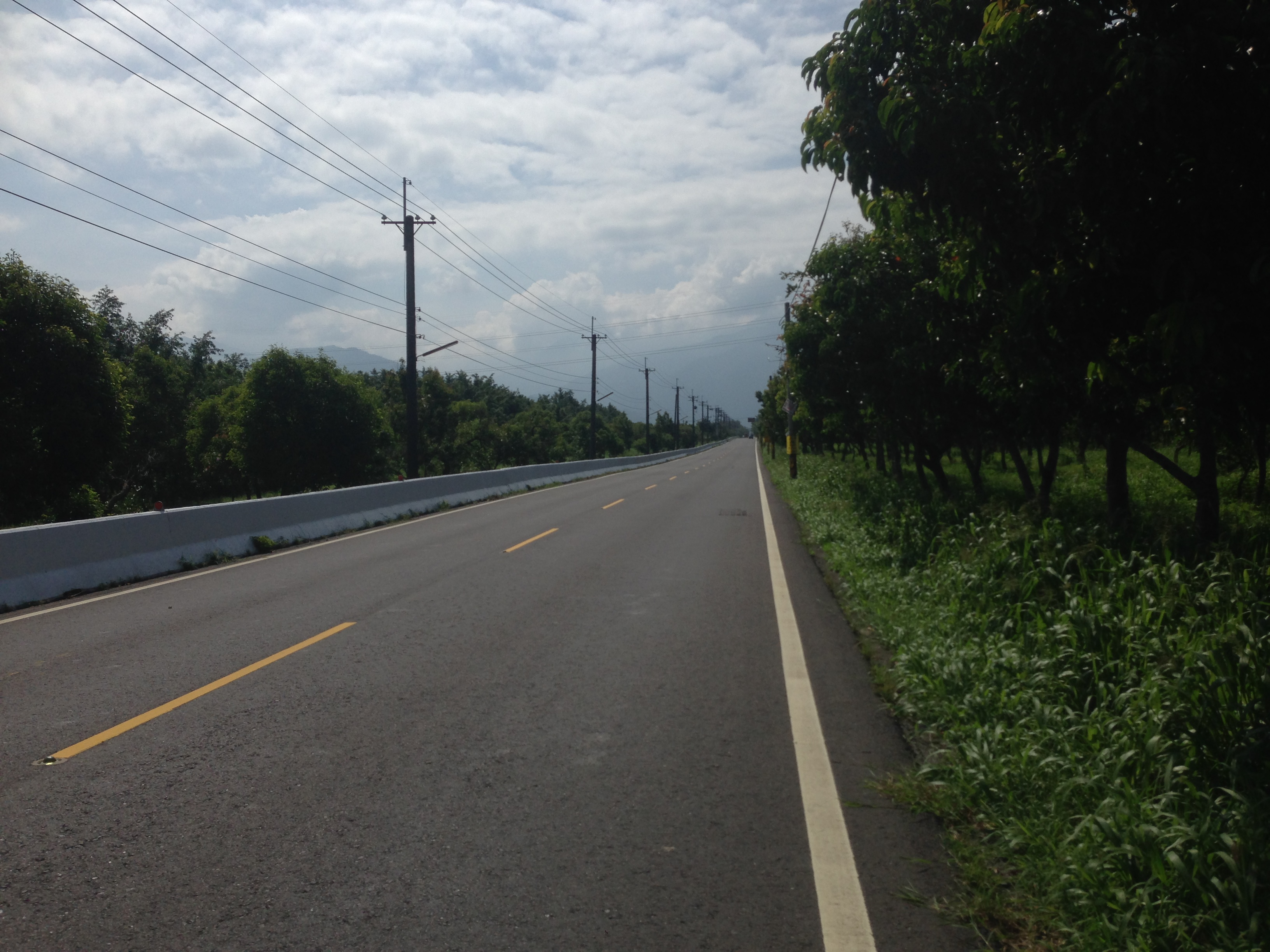 中文（台灣）: 潮義路(185甲)